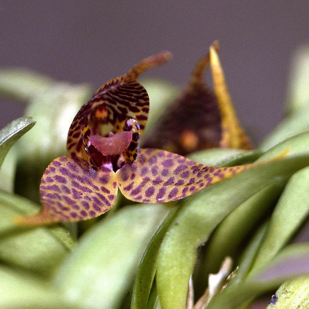 Dryadella simula